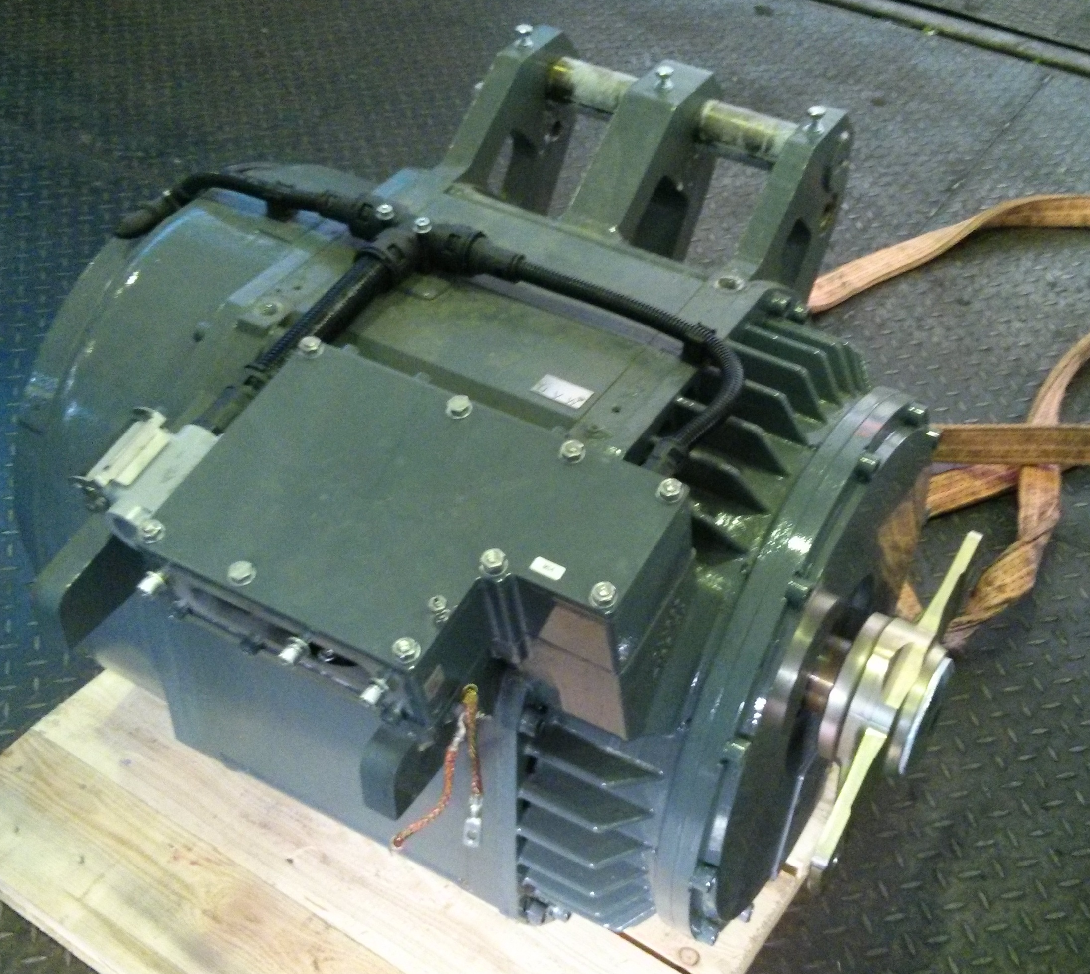 Асинхронный тяговый электродвигатель MLU3839K/4 вагона метро 81-556 НеВа